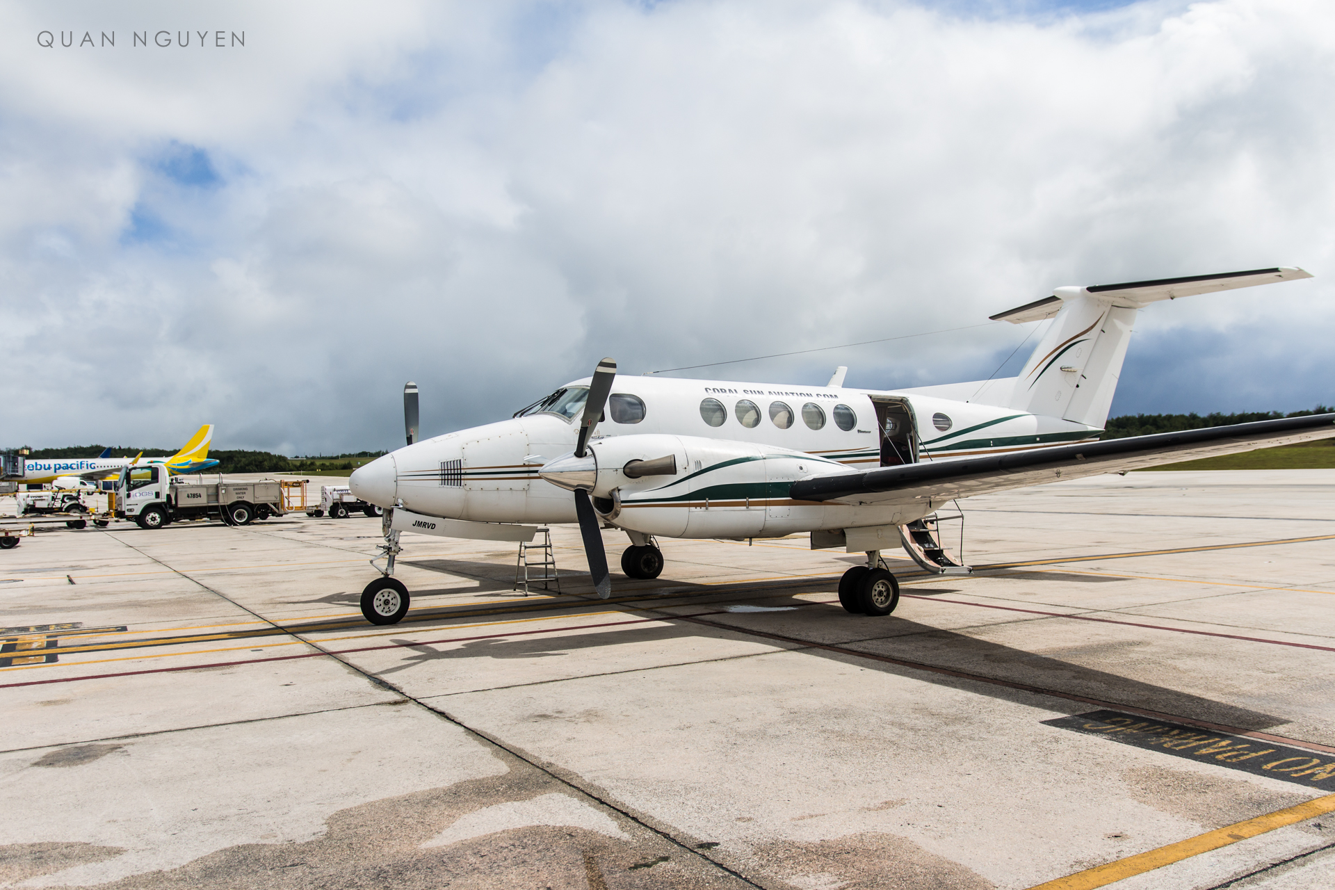 The Beechcraft King Air from Coral Sun Airways